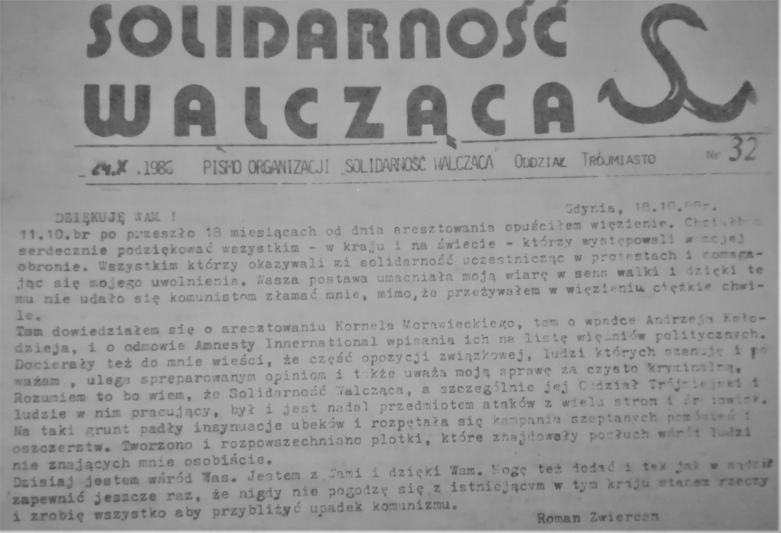 Solidarność Walcząca, O/Trójmiasto, nr 32/1988 r.